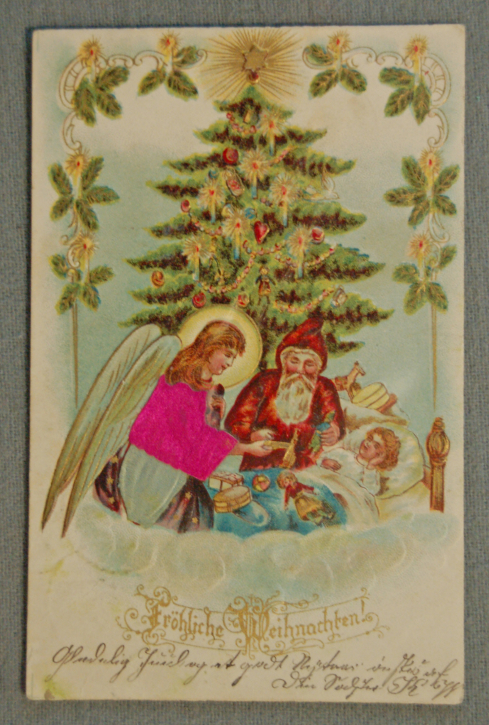 Weihnachtspostkarte aus Deutschland um 1900